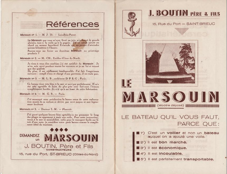 Prospectus décrivant le Marsouin, un voilier.